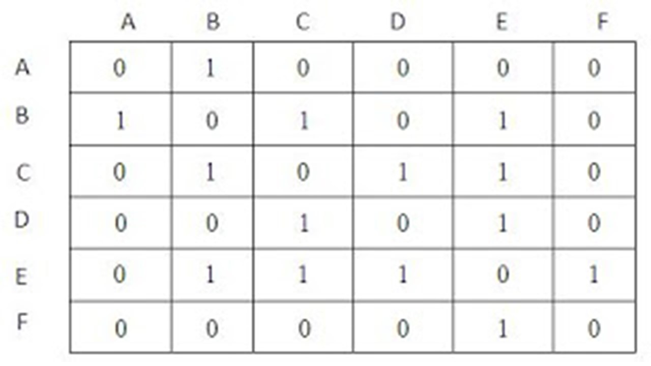 เมติริกซ์ของกราฟไม่ระบุทิศทาง